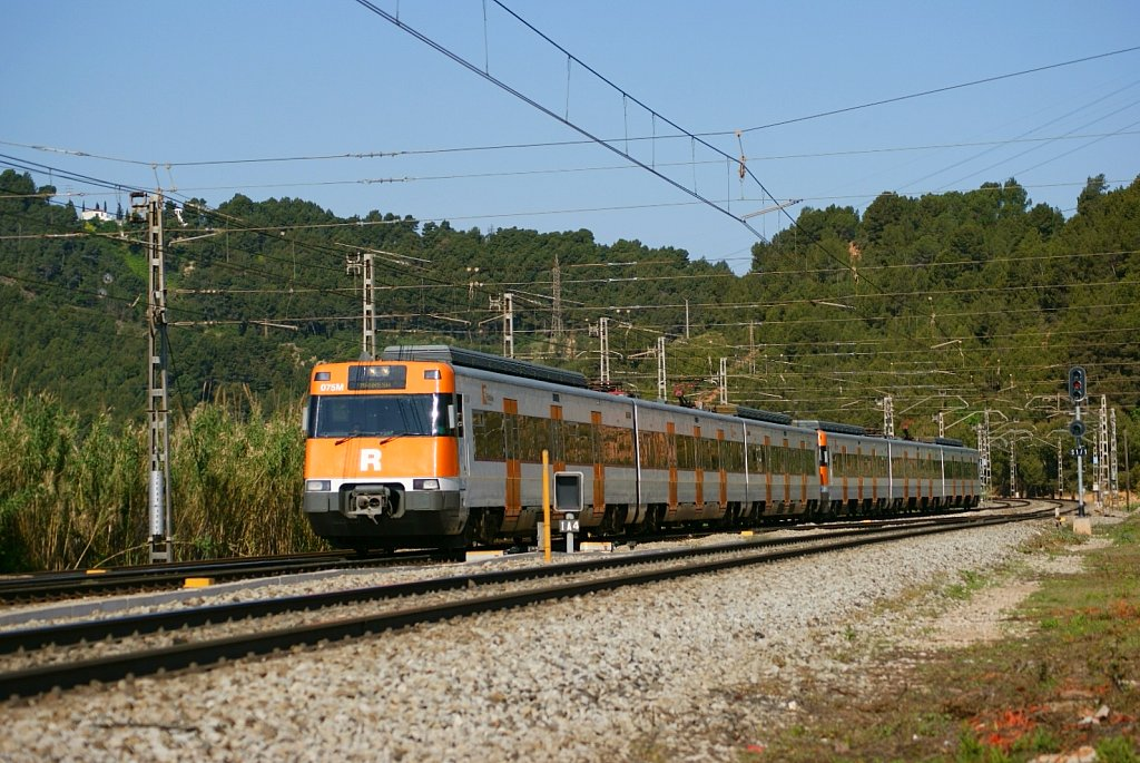 Doble d'unitats 447 al seu pas per l'estació de Castellbisbal.